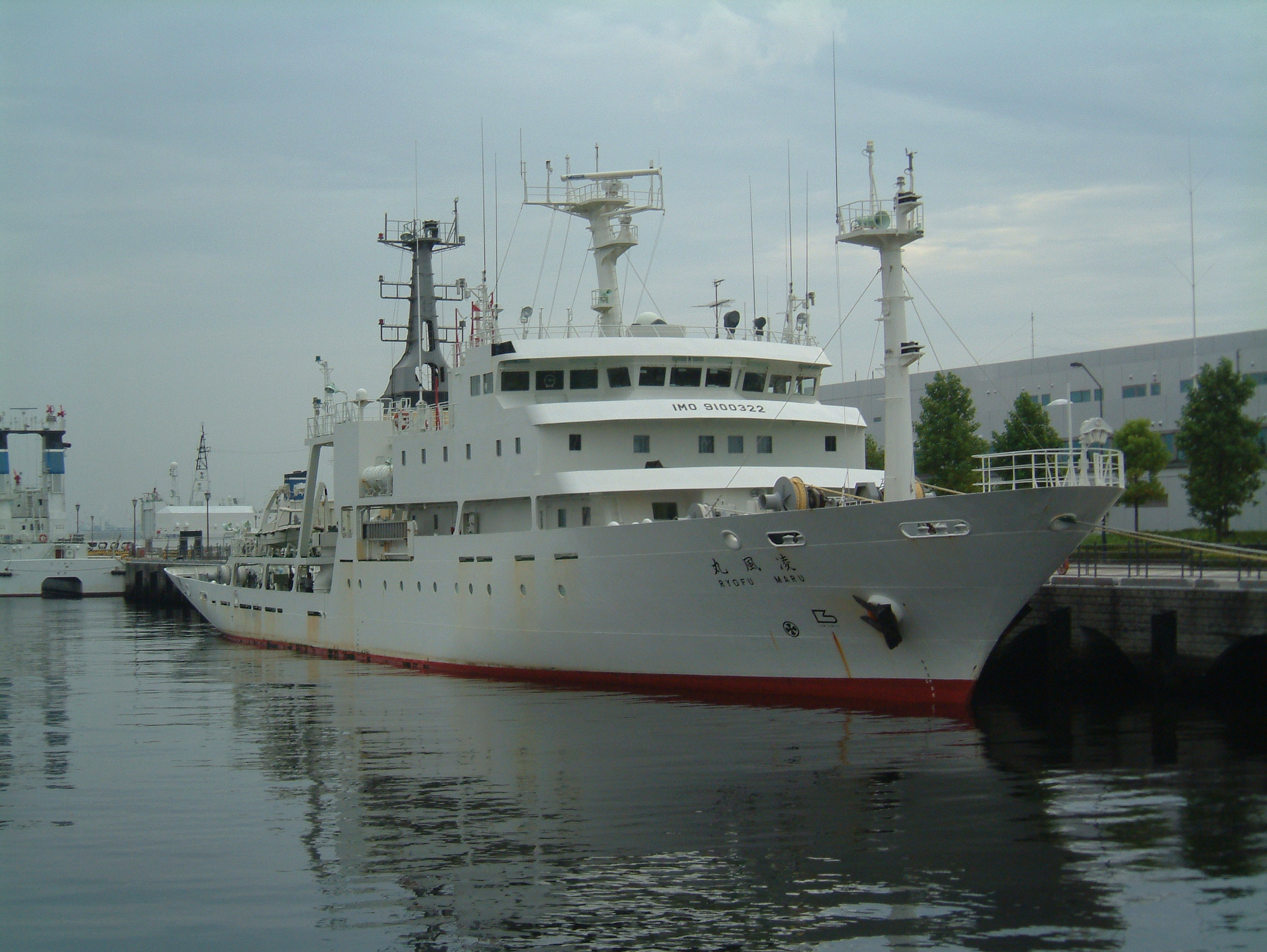 気象庁・海洋情報研究センターの海洋気象観測船凌風丸（りょうふうまる）、横浜市中区の新港ふ頭で撮影で撮影